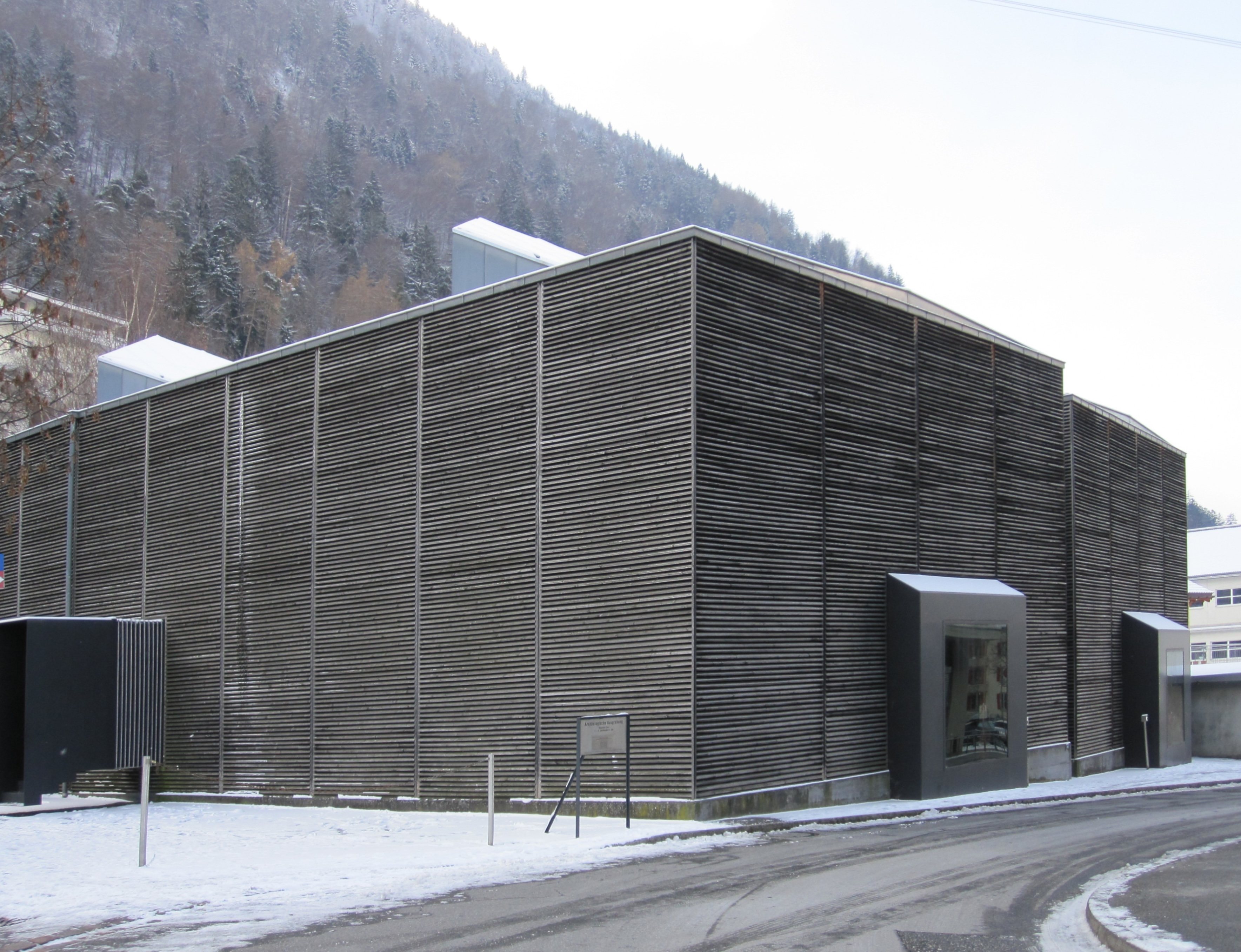 Schutzbauten (über archäologischer Fundstelle) im Welschdörfli in Chur.